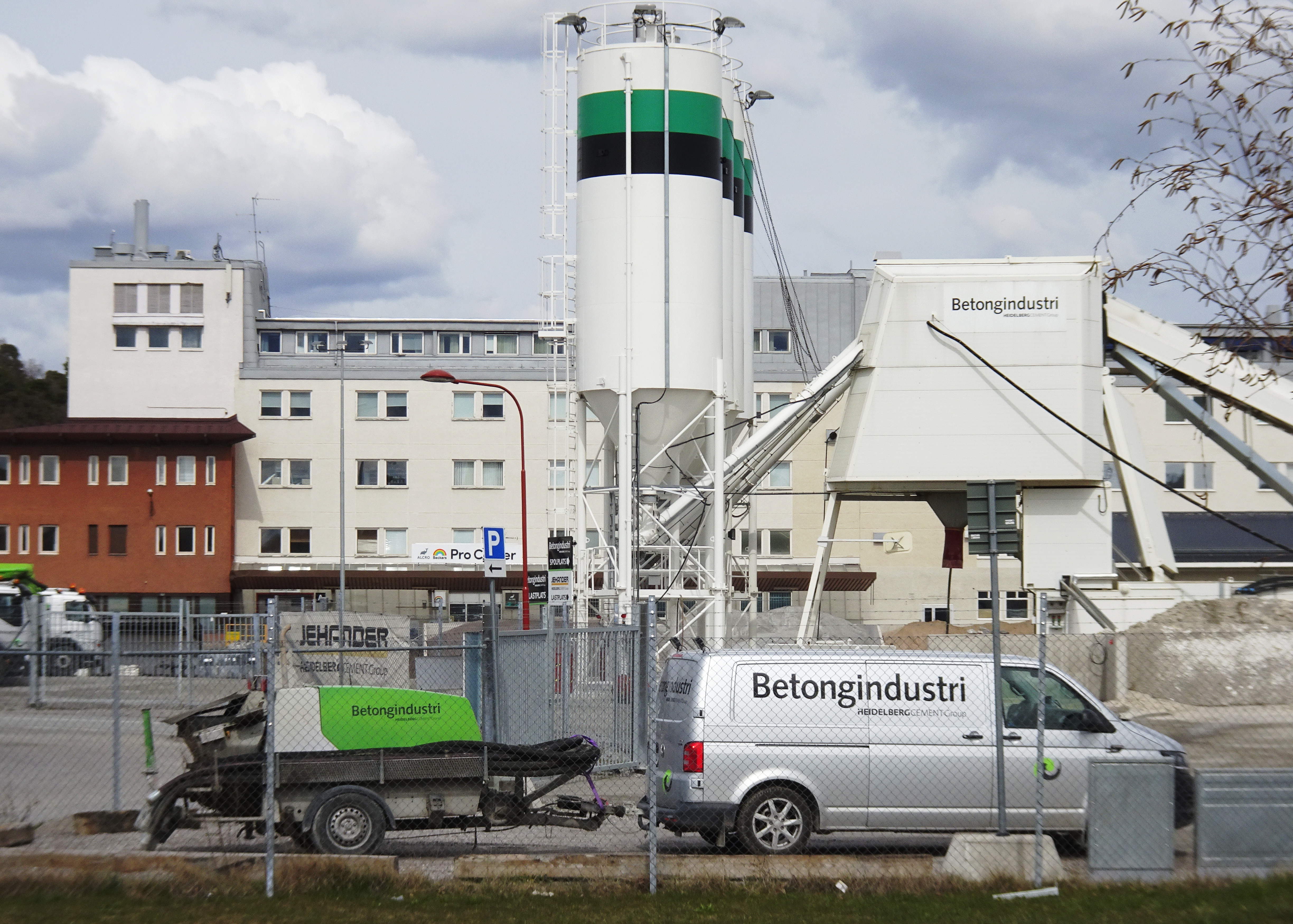 Betongindustris Johannesfredsanläggning vid Ulvsundasjön